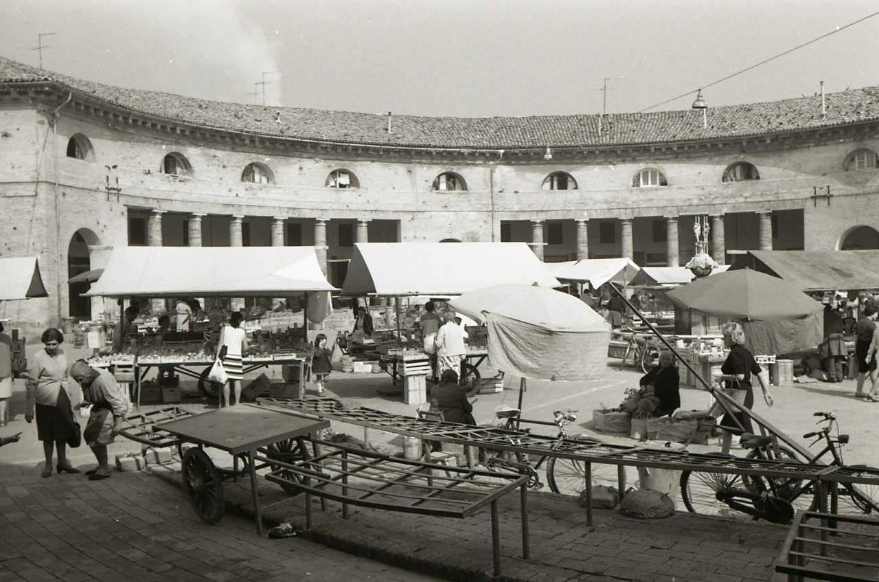 Servizio fotografico : Senigallia, 1969 / Paolo Monti. - Strisce: 7, Fotogrammi complessivi: 38 : Negativo b/n, gelatina bromuro d'argento/ pellicola ; 35 mm. - ((I fotogrammi hanno una doppia numerazione. s. - Sul portanegativi: Nikon FP4. - Sul dorso del portanegativi Monti specifica: "Marche". - Occasione: Documentazione per la pubblicazione: "TOURING CLUB ITALIANO, Marche, Milano, TCI, 1971". - Fonte: Agenda di Paolo Monti: Monti/ 3 aprile 1966 - 9 marzo 1971/ 12421-16823 (1966-1971), presso Archivio Paolo Monti. - Fonte: Monografia: TOURING CLUB ITALIANO, Marche, Milano, TCI, 1971 (1971). - Fonte: Agenda di Paolo Monti: Monti - Agenda 1969 (1969), presso Archivio Paolo Monti